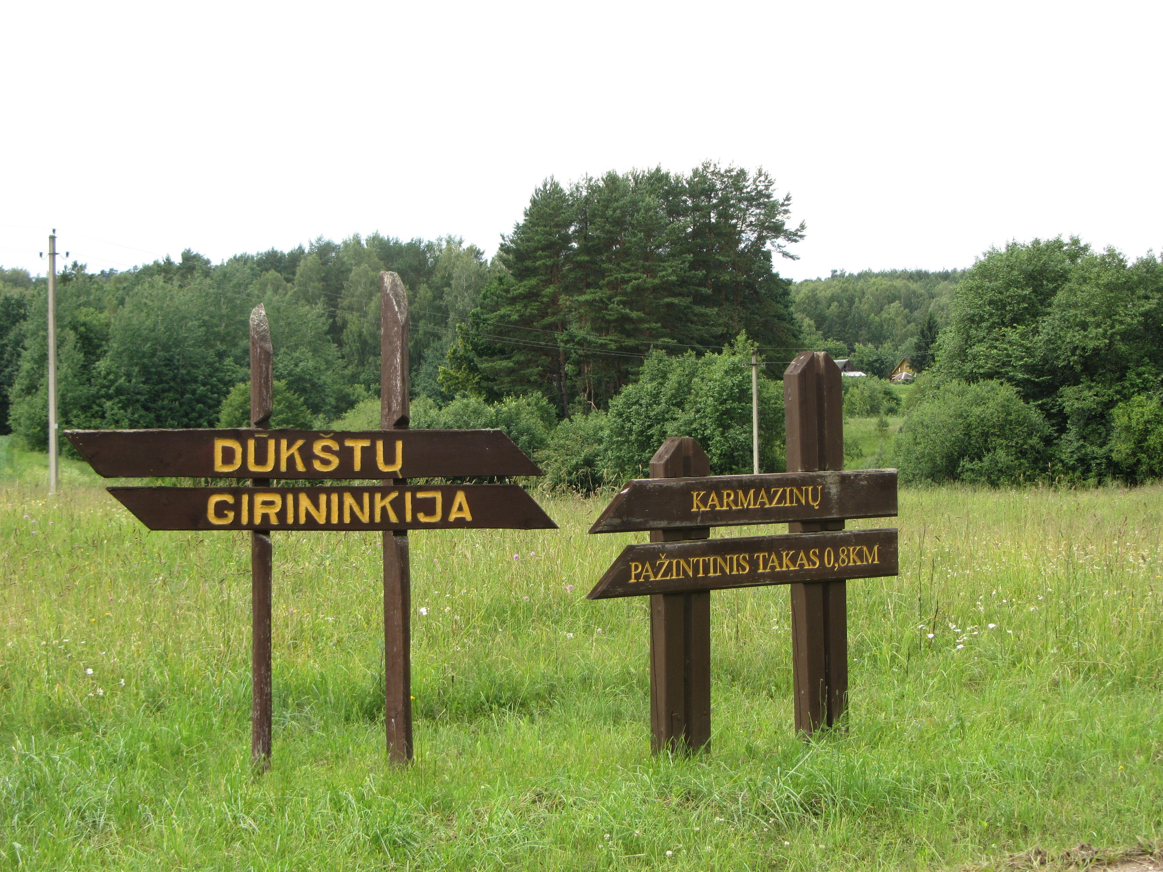 Adomčiškės, Lithuania